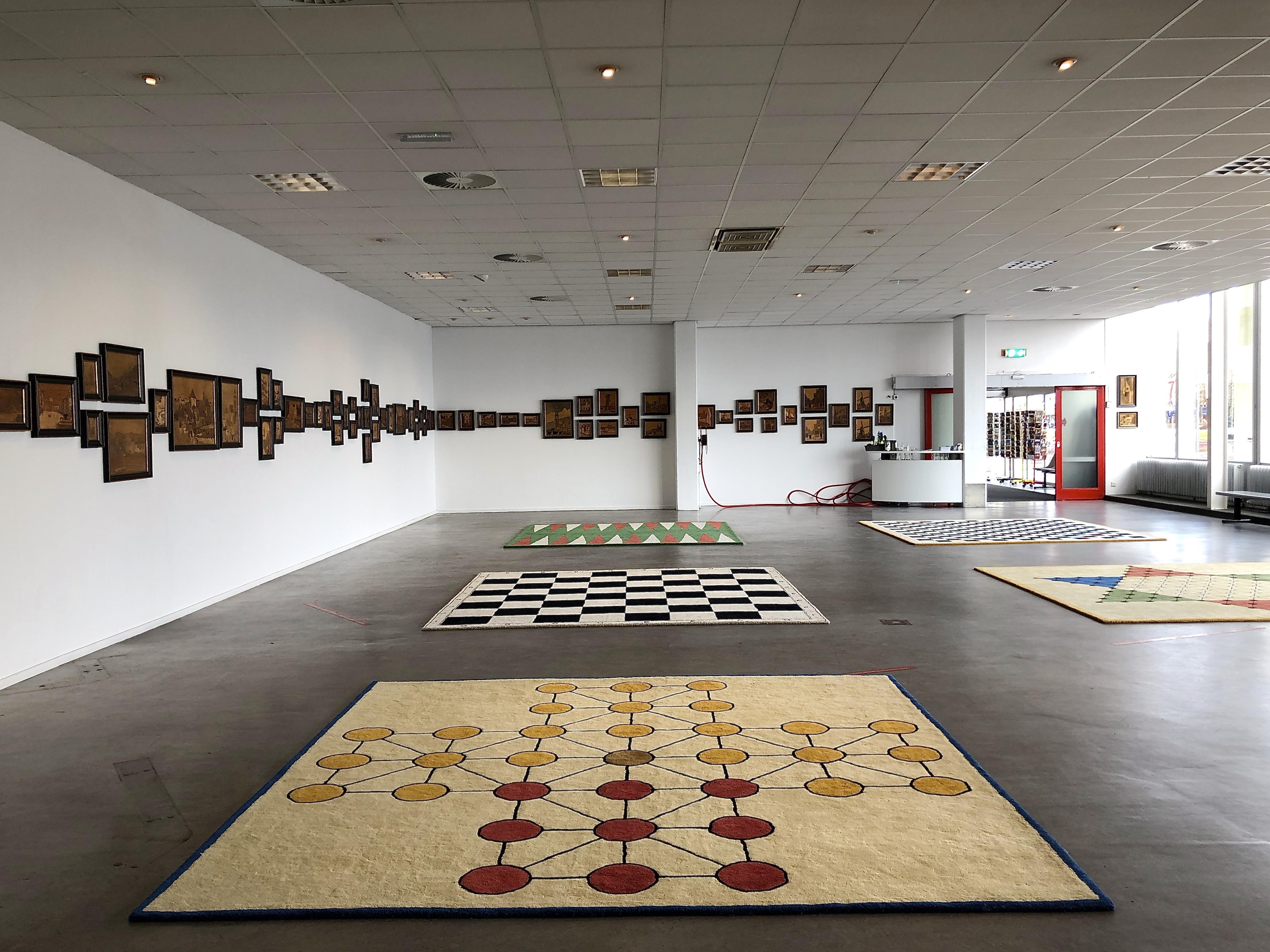 Na jaren van juridisch gesteggel is de gemeente Den Helder op 17 april 2018 begonnen met de ontruiming van het privémuseum annex woonhuis van kunstenaar Rob Scholte en zijn gezin. Het gebouw -een voormalig postkantoor van de architect Jo Kruger uit 1965- wordt gesloopt t.b.v. appartementen. Wellicht mede omdat een sluiting van het museum al enige tijd boven de markt hing, zijn de kunstwerken, die van de hand van heel veel verschillende kunstenaars zijn, nooit gelabeld, alles hing door elkaar waardoor het museum in mijn ogen nogal rommelig oogde.